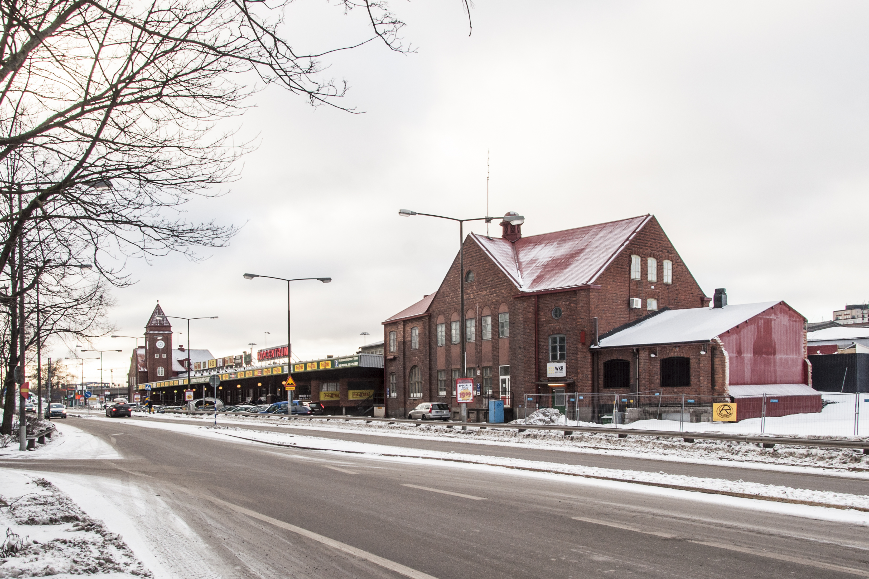 Norra Stationsgatan med Stockholms Norra station